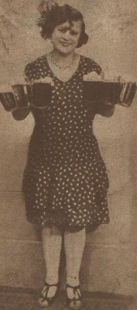 Laura Třešňáková, česká divadelní herečka